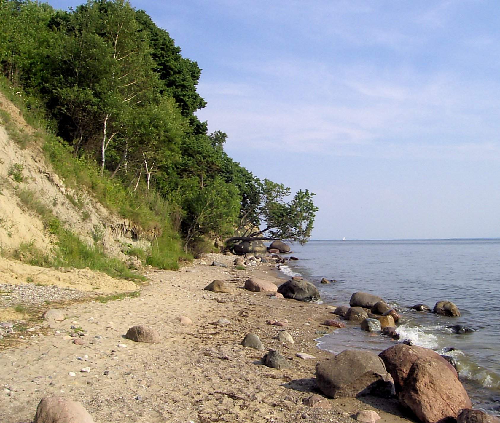 Steilküste westlich von Gager